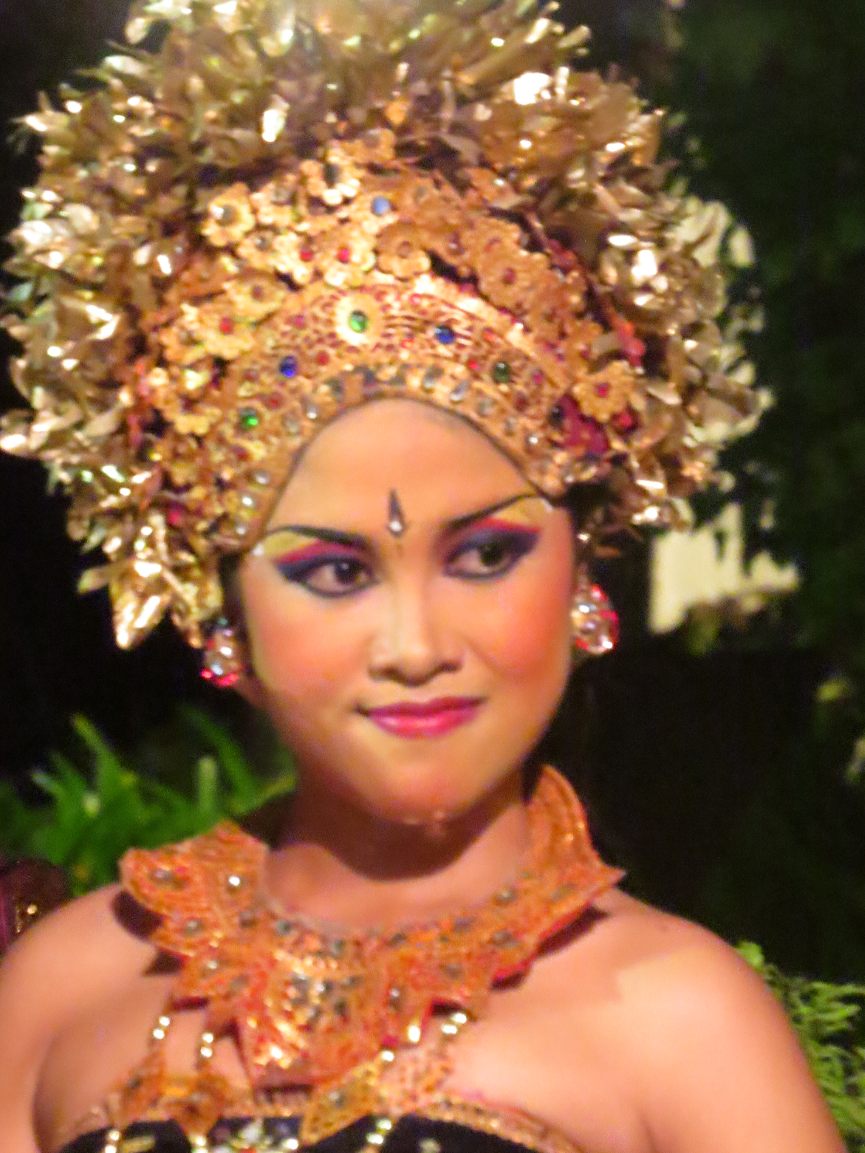 רקדנית בריקוד מתוך הראמאיאנה